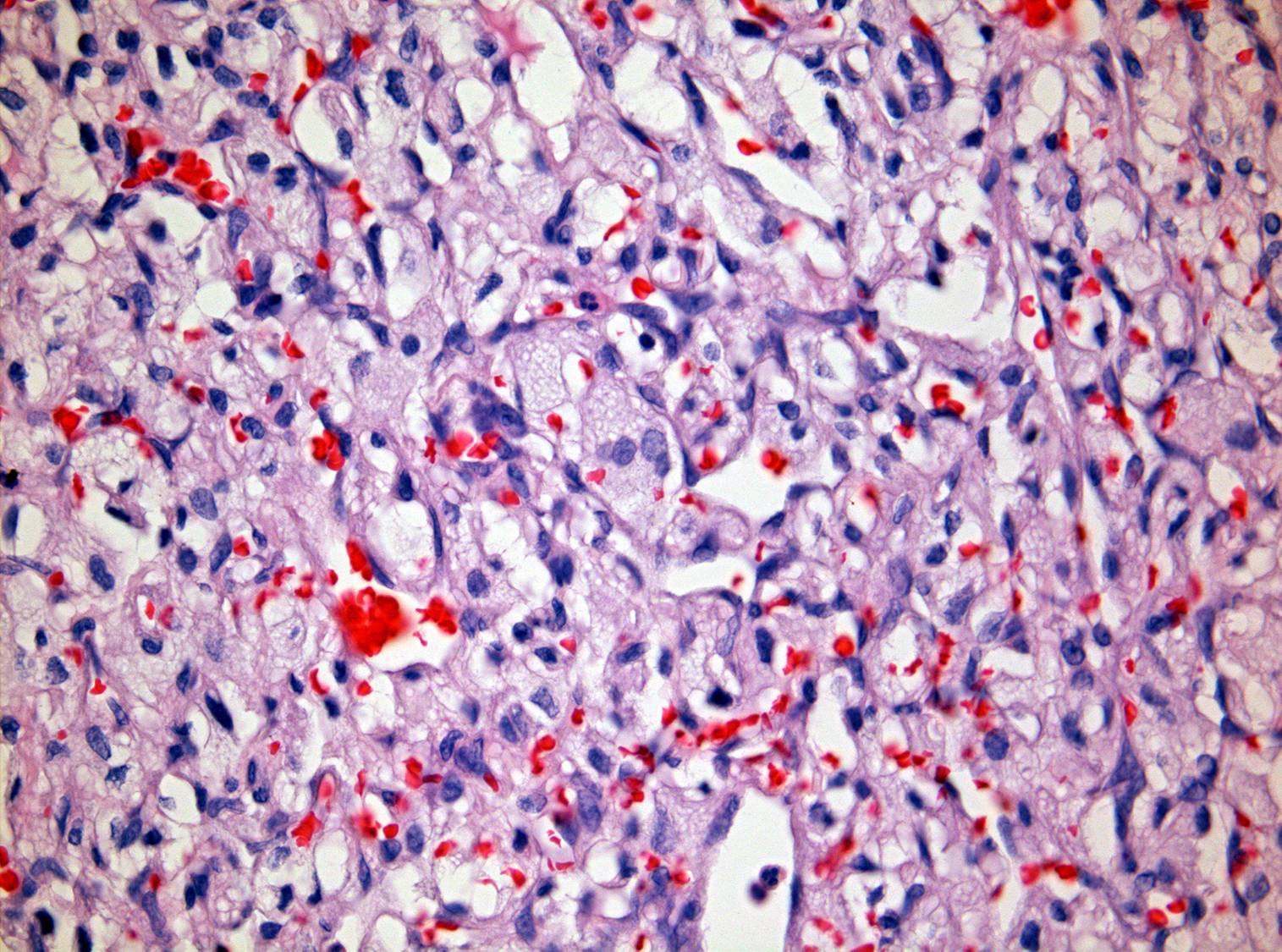 Histologie eines Hämangioblastoms